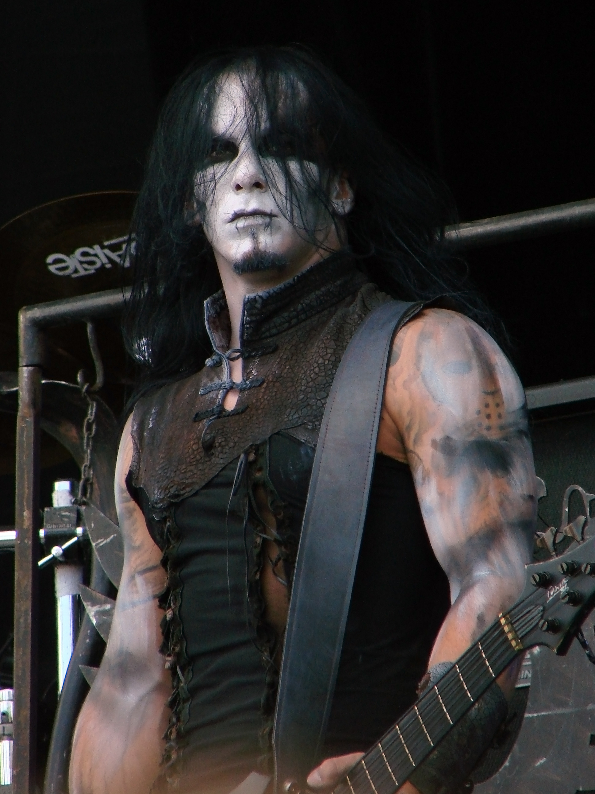 Behemoth au Hellfest, le 20 Juin 2010 : Orion.